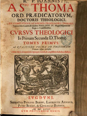 Cursus theologici de Jean de Saint-Thomas à propos de saint Thomas d'Aquin. Édition de 1663 (Lyon).